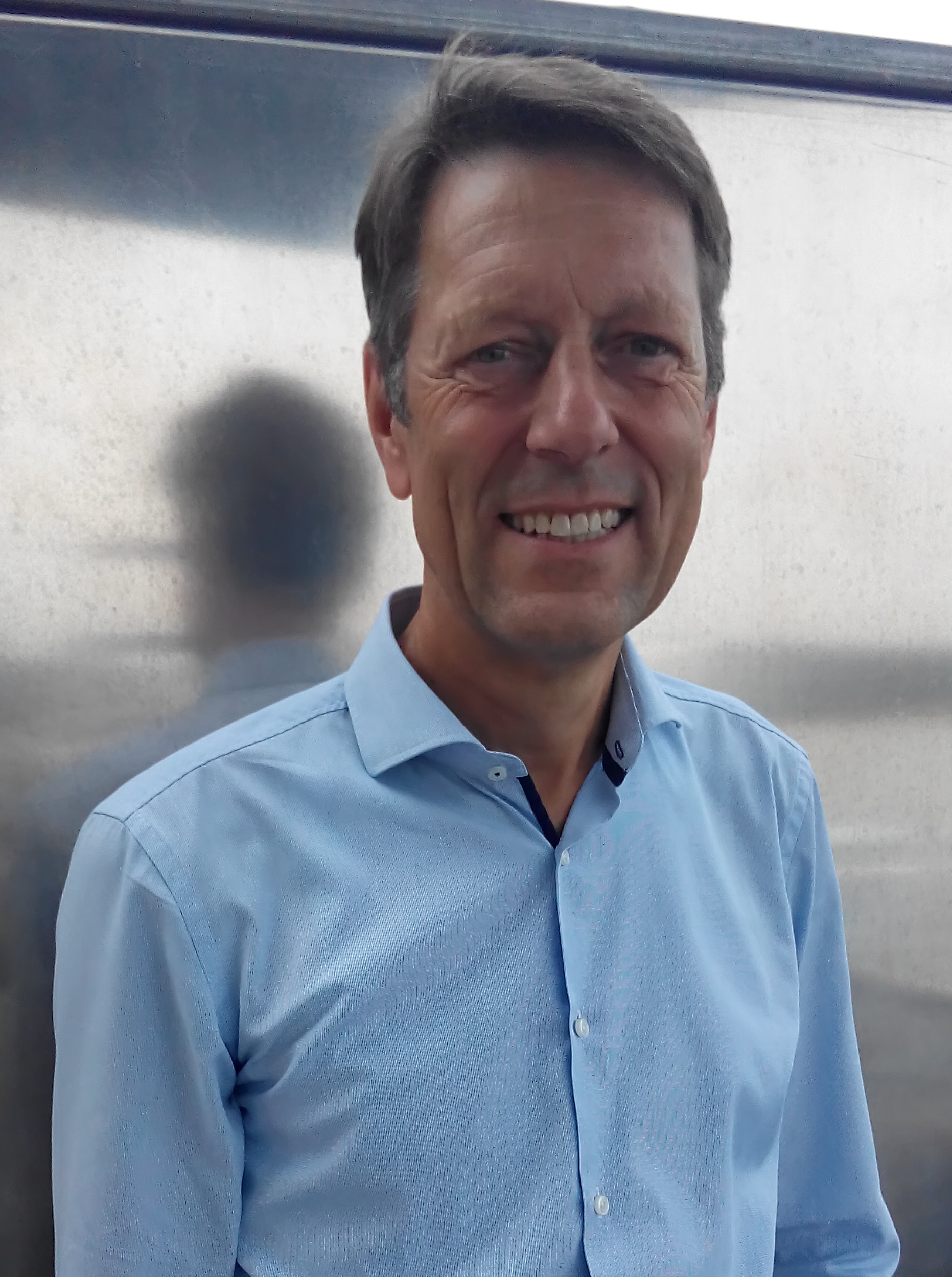 Portrait auf der MS Wissenschaft